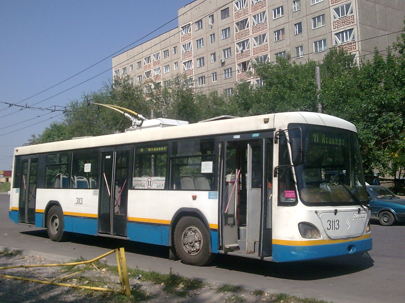 Алматинский троллейбус. Модель «Казахстан». Маршрут #11.